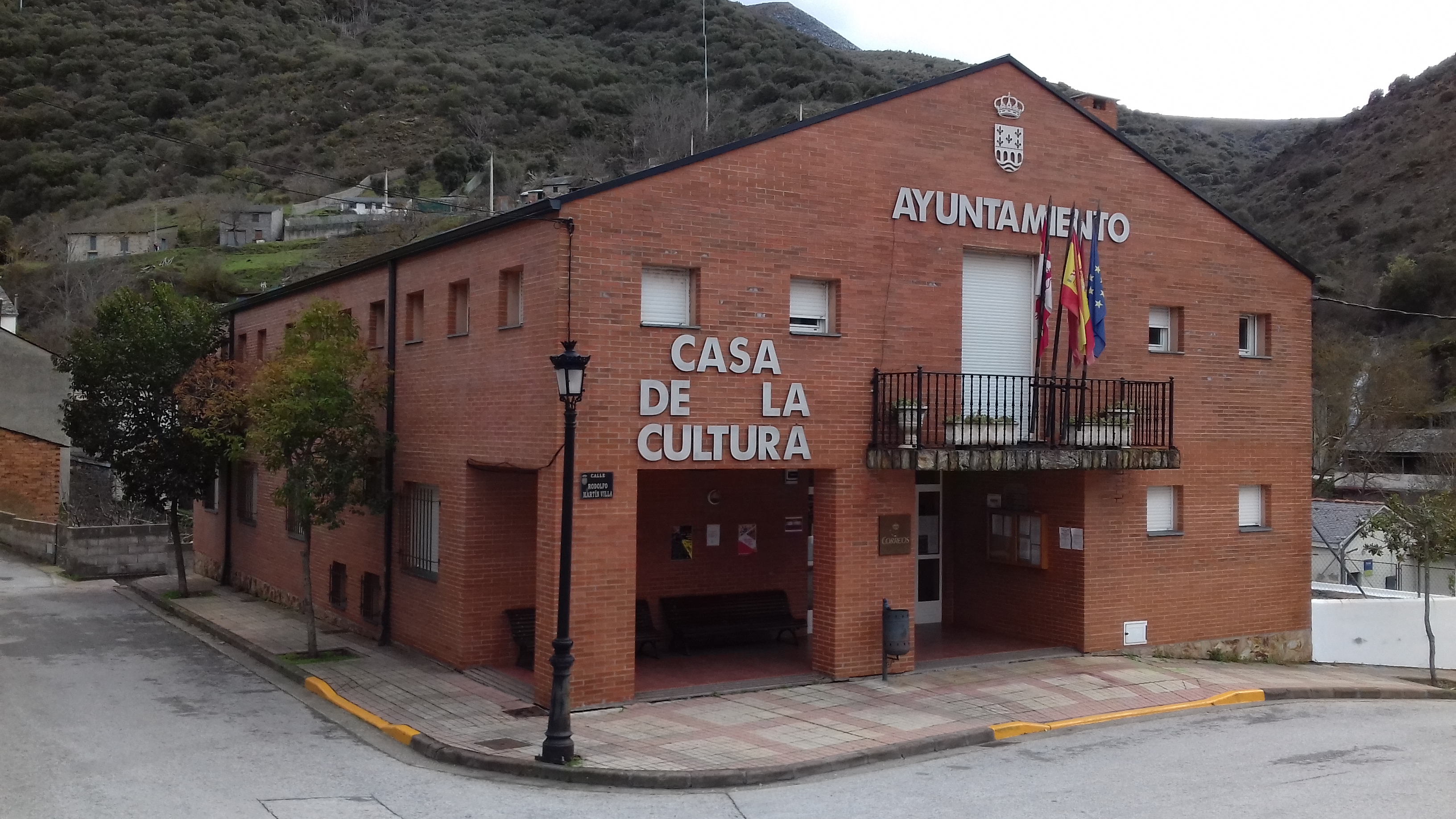 Casa Consistorial da Ponte de Domingos Flórez